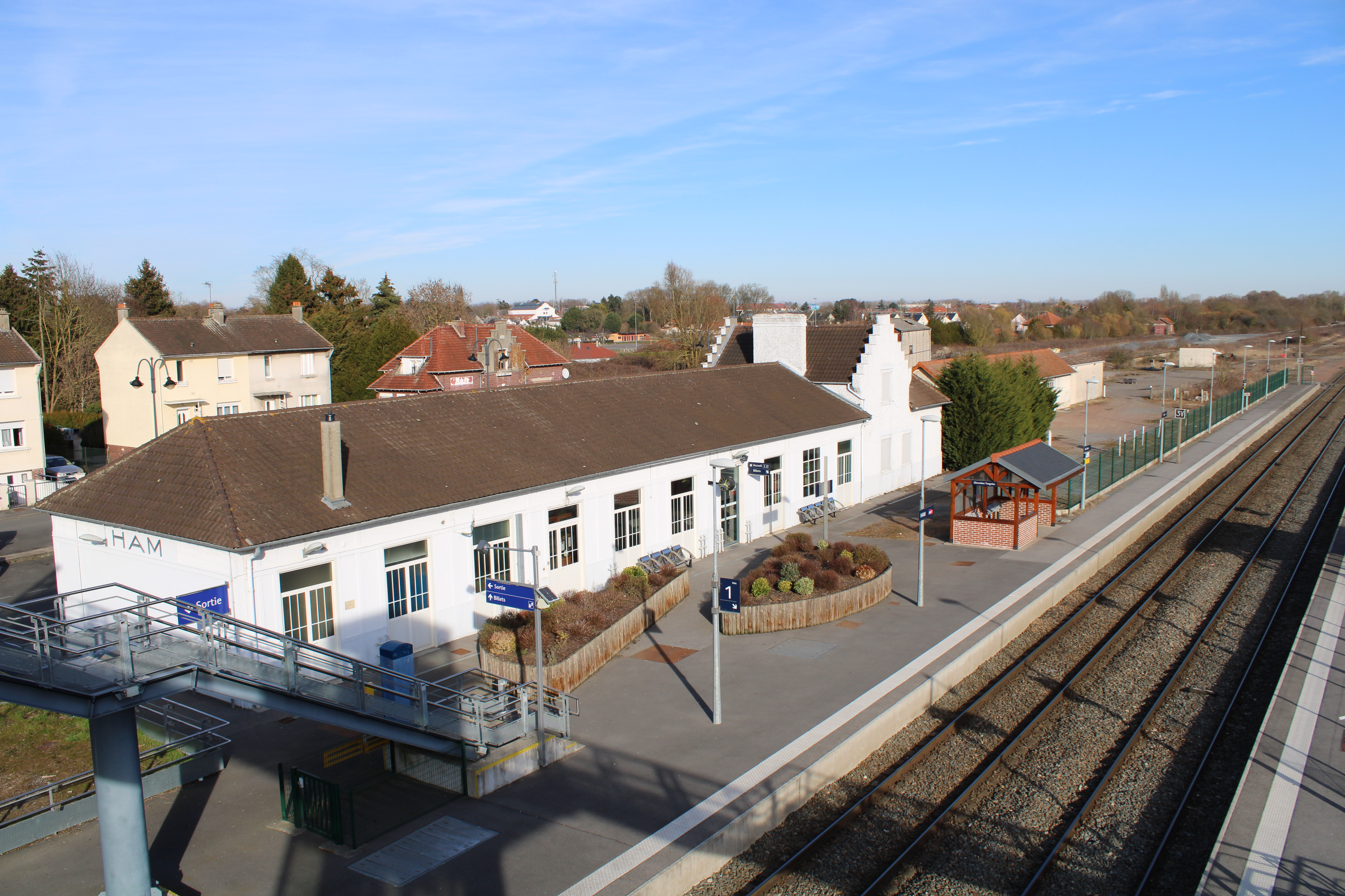 La gare de Ham côté voies en 2019.